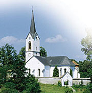 Kostol svätého Michala Týči sa na skale nad obcou a svojou polohou má dominantné postavenie. Je to jednoloďový, gotický kostol. Vznikol v 13. storočí. Zaujímavé je, že presbytérium nie je od lode oddelené víťazným oblúkom.1 Vznikol v 13. storočí. Okolo roku 1486 prevzal správu majetku v obci Štefan Mariássy, ktorý svoju oddanosť náboženskému duchu prejavil výstavbou dvoch gotických kaplniek ku kostolu. Zo severnej strany to bola kaplnka sv. Kozmu a Damiána, patrónov lekárov a zdravia, z južnej strany kaplnka sv. Anny, patrónky jeho matky. Sieťová klenba kostola je z 15. storočia. Južná kaplnka svätej Anny má pekný portál, ktorého hlavice sú zdobené motívom viniča. Po požiaroch v rokoch 1773 a 1882 bol kostol následne obnovený, zväčšený a zariadený oltármi i novou výzdobou. Dnešná veža je z roku 1891. Z vnútorného zariadenia sú najcennejšie náhrobné kamene Mariássyovcov z červeného mramoru zo 16. a 17. storočia. Ostatný interiér je barokový, bohatý a historicky veľmi cenný. This medium shows the protected monument with the number 810-679/0 in the Slovak Republic.